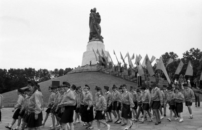 ADN-ZB/Uhlemann/27.7.87/Berlin: Ehrung/ Mit einer Kranzniederlegung am sowjetischen Ehrenmal in Treptow gedachten 335 Leninpioniere und Komsomolzen sowie 335 Thälmannpioniere und FDJler, die als Teilnehmer der diesjährigen Schülerfreundschaftszüge jeweils für drei Wochen ihre Partnerstädte in den Freundesländern besuchen, der gefallenen sowjetischen Soldaten und Offiziere.